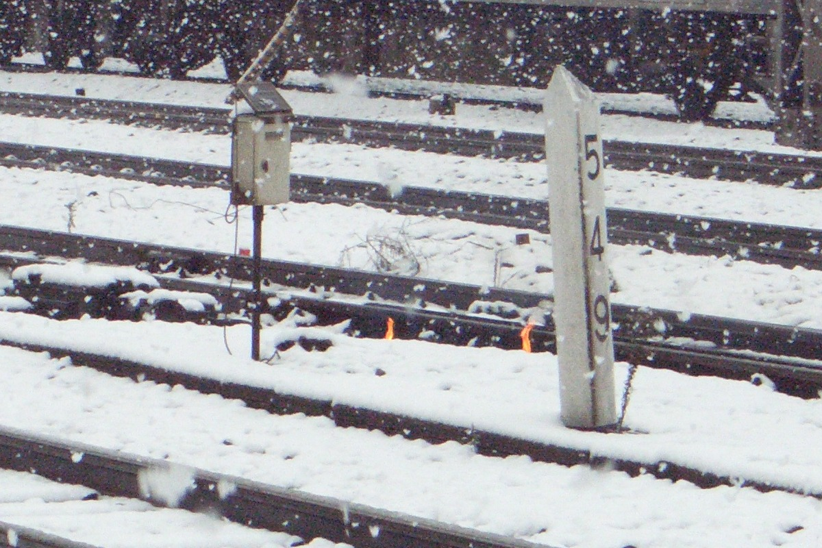 梅田貨物線の吹田信号場723イ分岐器